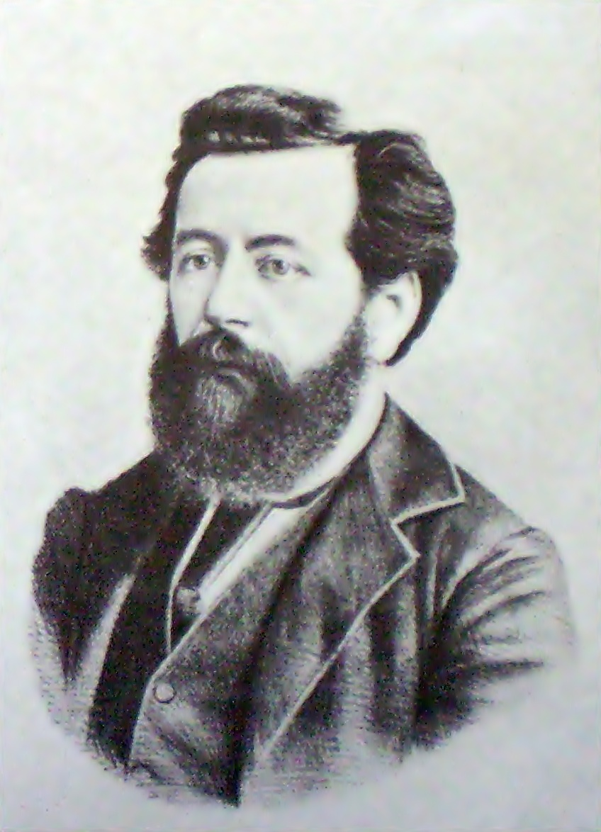 Dardo Rocha. Dibujo de E. Stein